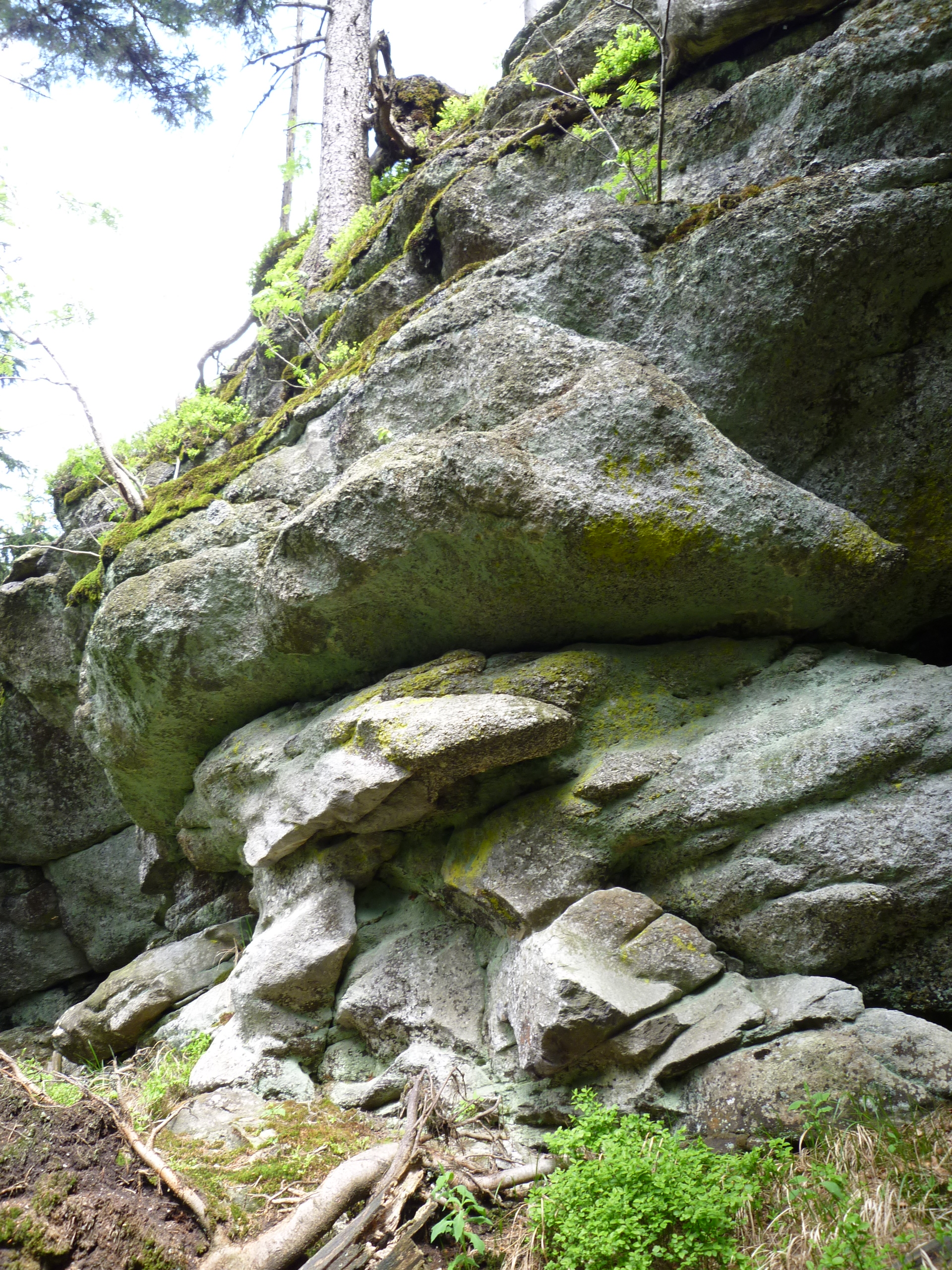 Felsformationen am Geotop "Großalmeyerschloß" im Nationalpark Bayerischer Wald.